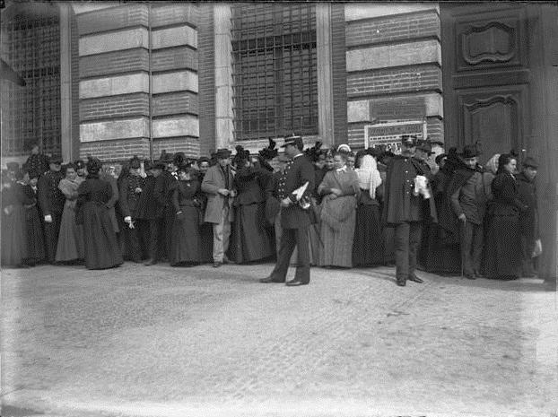 Théâtre du Capitole sur la place du même nom. 1898. Vue d'ensemble du public attendant devant le théâtre encadré par deux agents de police. Au premier plan place, agents de police, costume, casquette ; au second plan en rang, foule dont militaires, vêtement, chapeaux ; à l'arrière plan façade du théâtre avec inscription à droite "théâtre du capitole et tournée de Mme Favart".